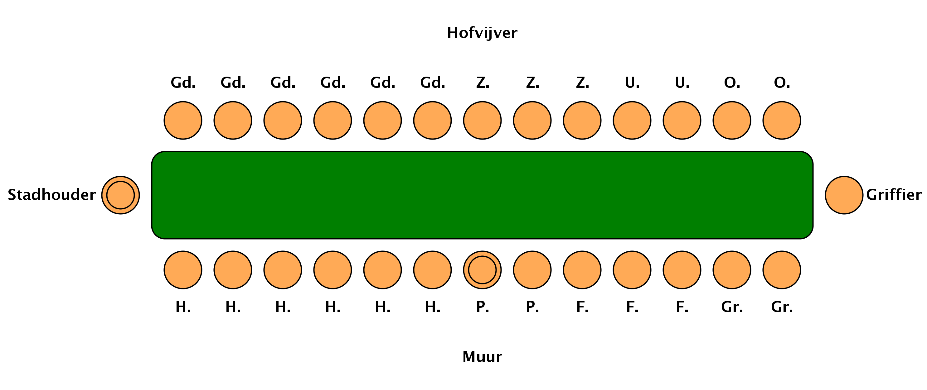 Schematische weergave van de zitplaatsen van de gedelegeerden naar de Staten-Generaal in de zeventiende en achttiende eeuw (Treveszaal). Iedere cirkel is een stoel, de dubbele cirkels zijn stoelen met leuning. De stoel van de stadhouder werd weggehaald wanneer er geen in functie was. De muurzijde en vijverzijde zijn waarschijnlijk op een gegeven moment omgedraaid. Legenda: P = President & tweede gedelegeerde presiderend gewest H = Holland (6x) Stadhouder Gd = Gelderland / Gelre (6x) Z = Zeeland (3x) U = Utrecht (2x) O = Overijsel / Overijssel (2x) Griffier Gr = Groningen / Stad en Lande F = Friesland